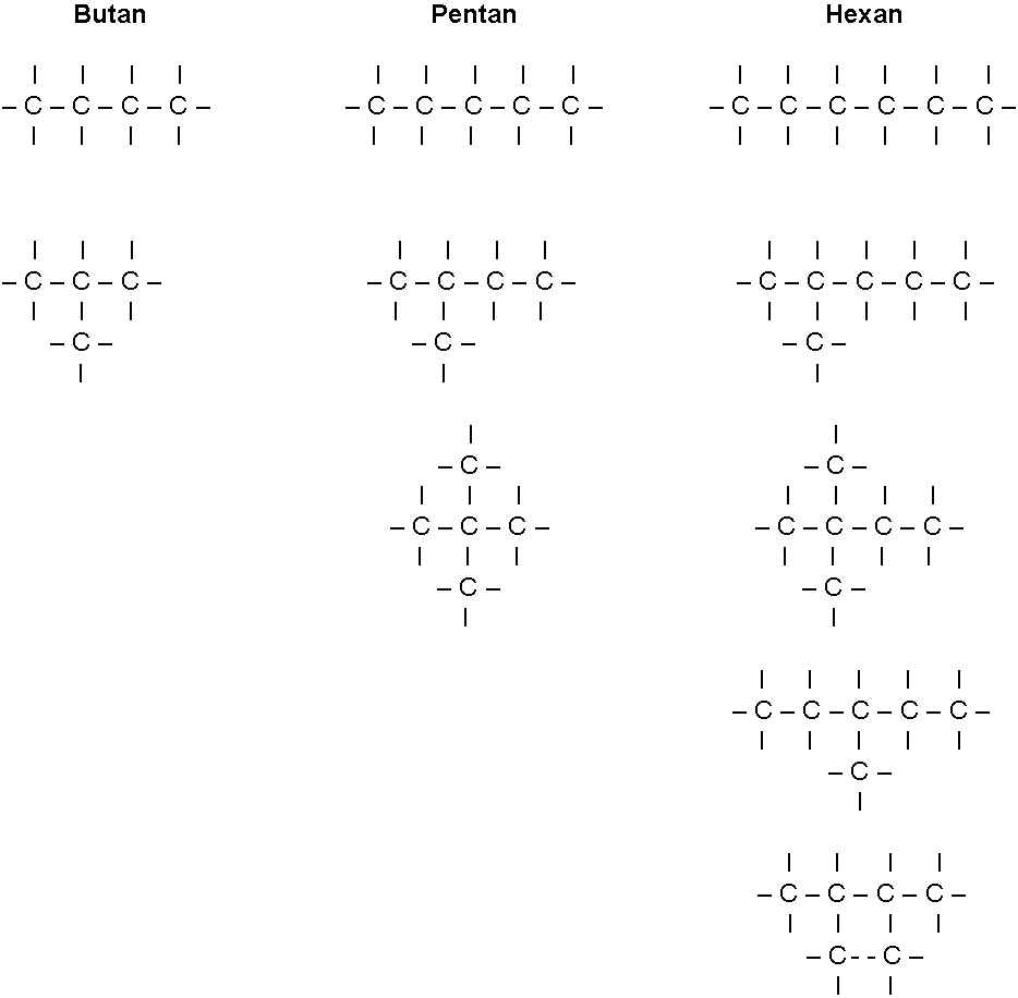 Strukturisomere von Butan, Pentan, Hexan